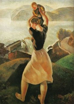 “Agurra” (Greetings), Aurelio Arteta